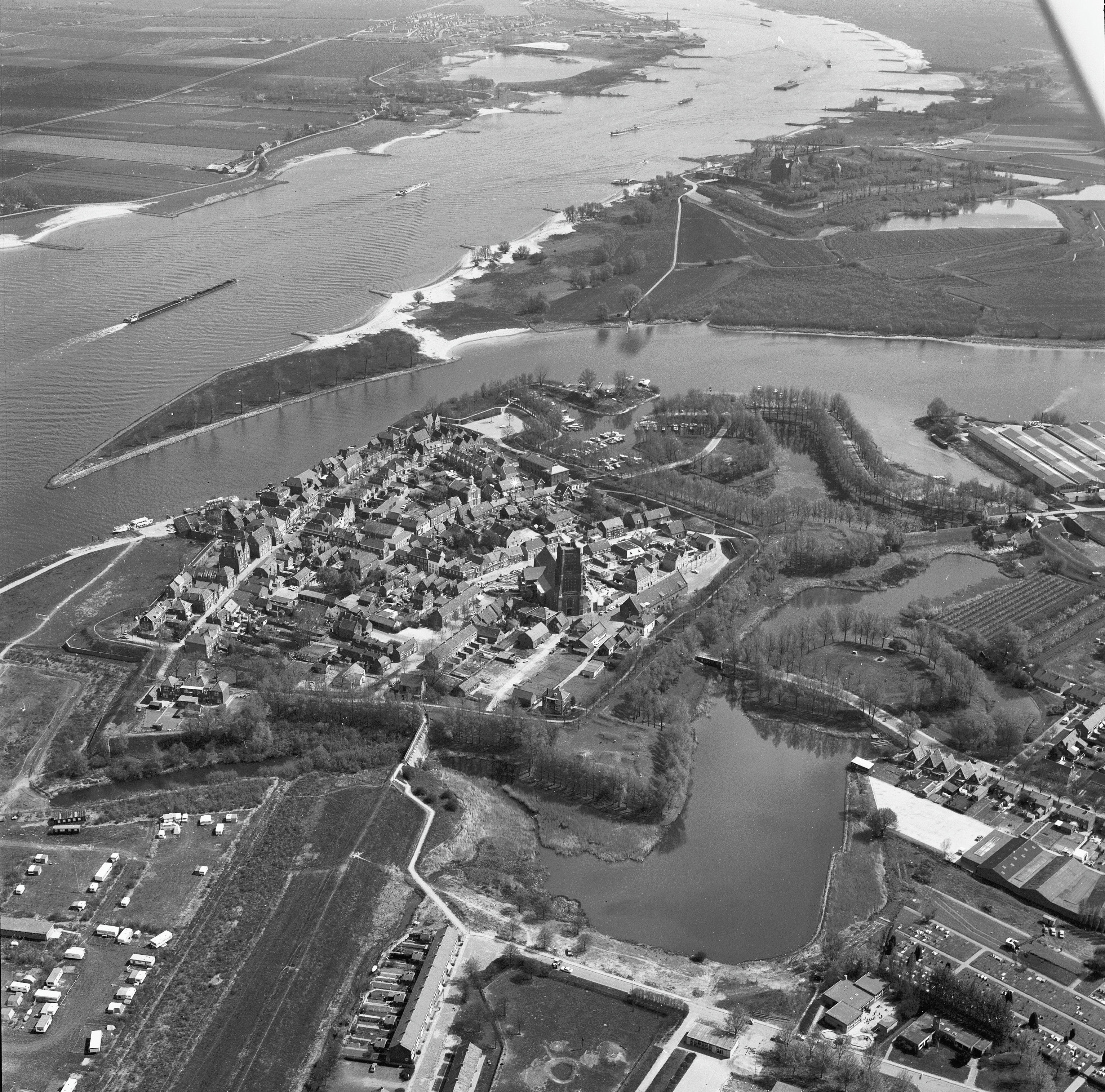 Hoftoren: luchtfoto's